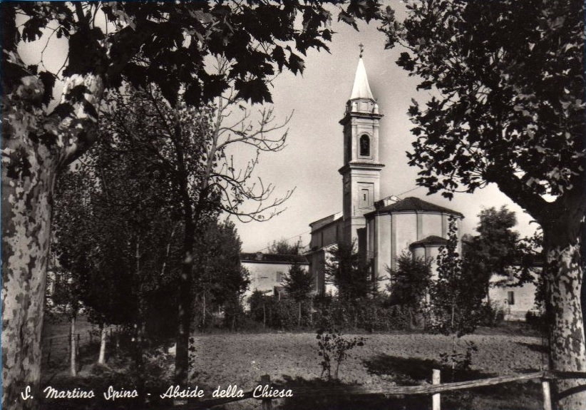 S. Martino Spino - Abside della Chiesa